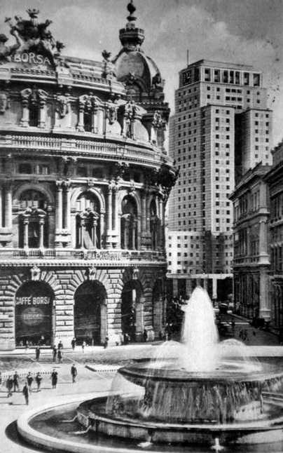 Piazza De Ferrari con la fontana e, sulla destra, la Torre Piacentini, in un'immagine di fine anni '40.